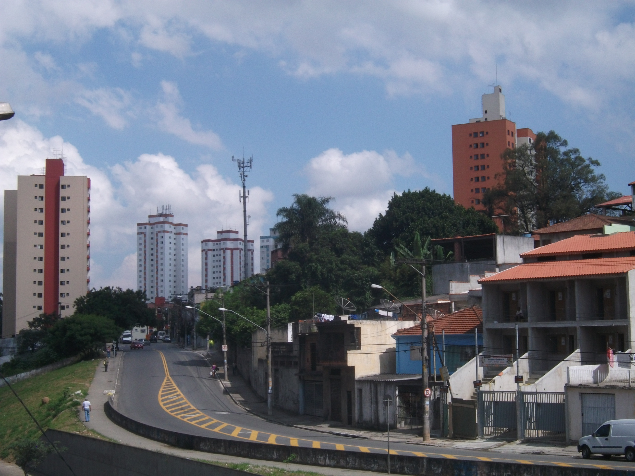 Vista de trecho do bairro Vila Carmosina nas proximidades da estação Dom Bosco da CPTM.